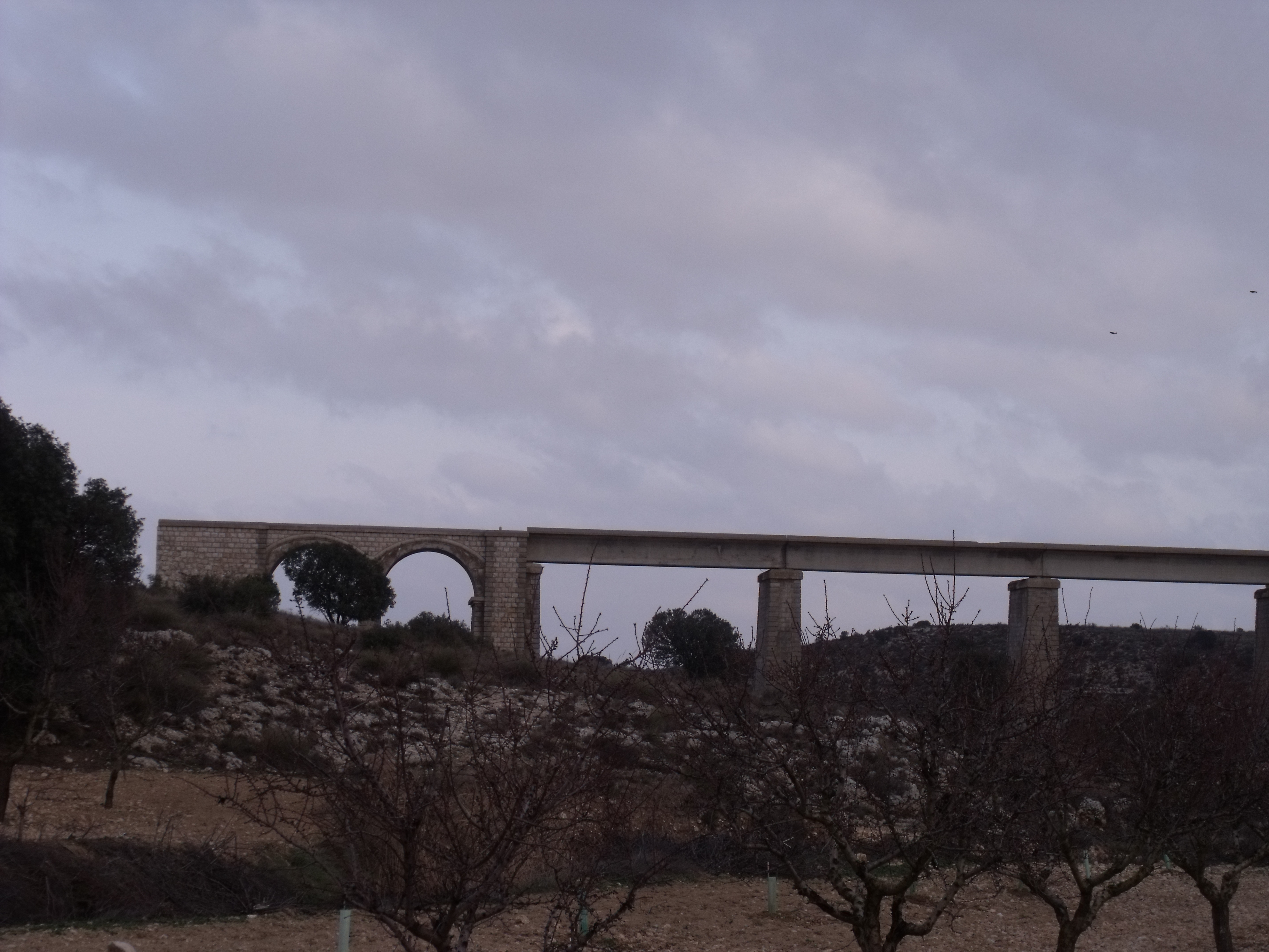 Puente del ferrocarril sobre el río Valdemembra